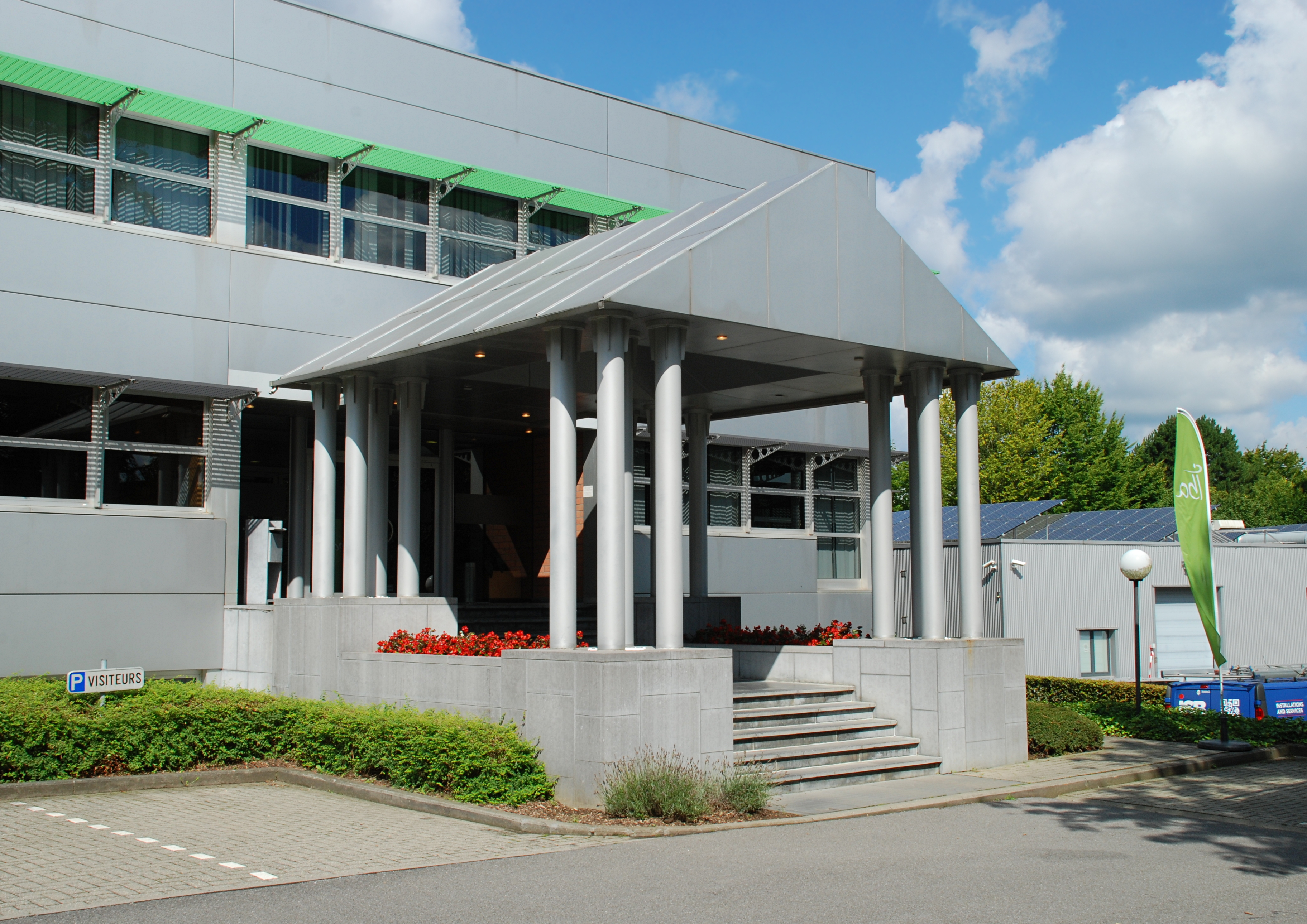 Belgique - Louvain-la-Neuve - siège d'IBA (chemin du Cyclotron 3 - Architecture postmoderne - DSW Architects 1991)